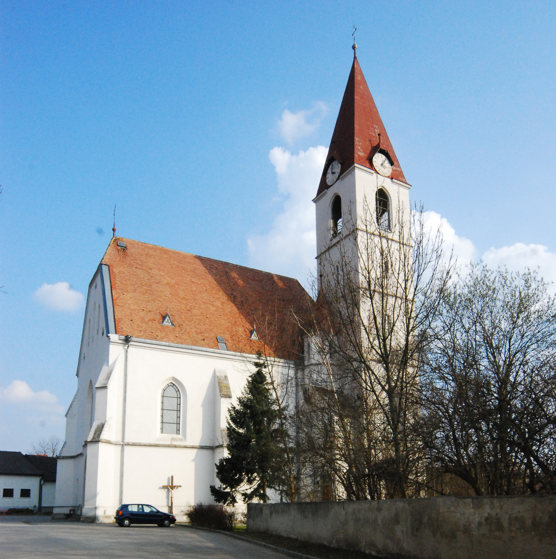 katholische Pfarrkirche heiliger Markus